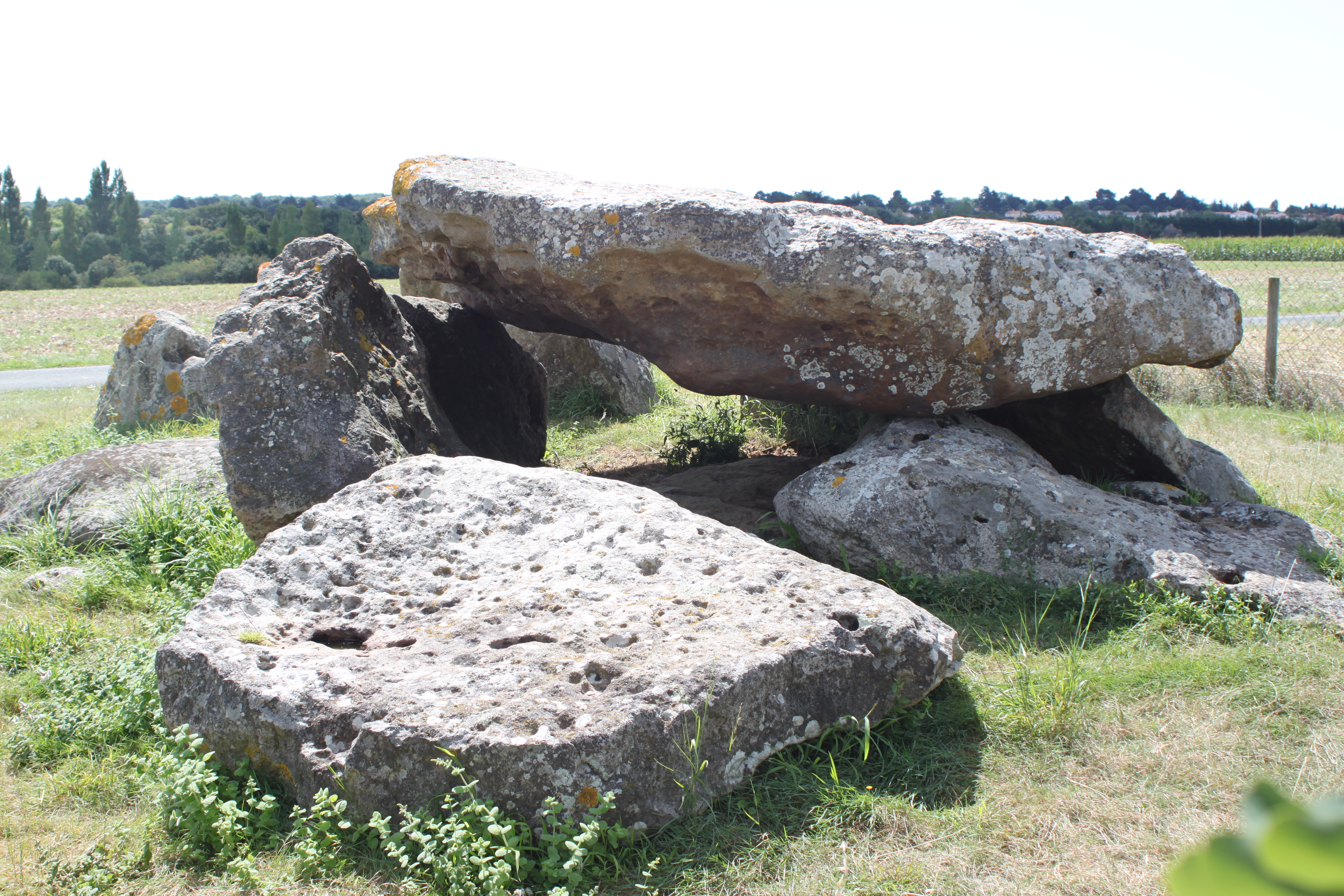 Dolmen du Grand-Bouillac, Fr-85-Saint-Vincent-sur-Jard.